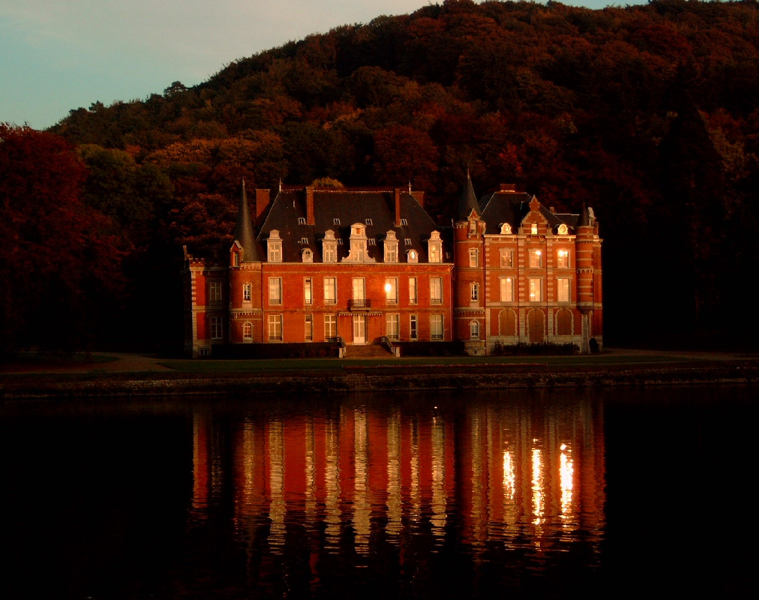 Het kasteel van de Heren van Dave. Eigen opname, herfat 2005.